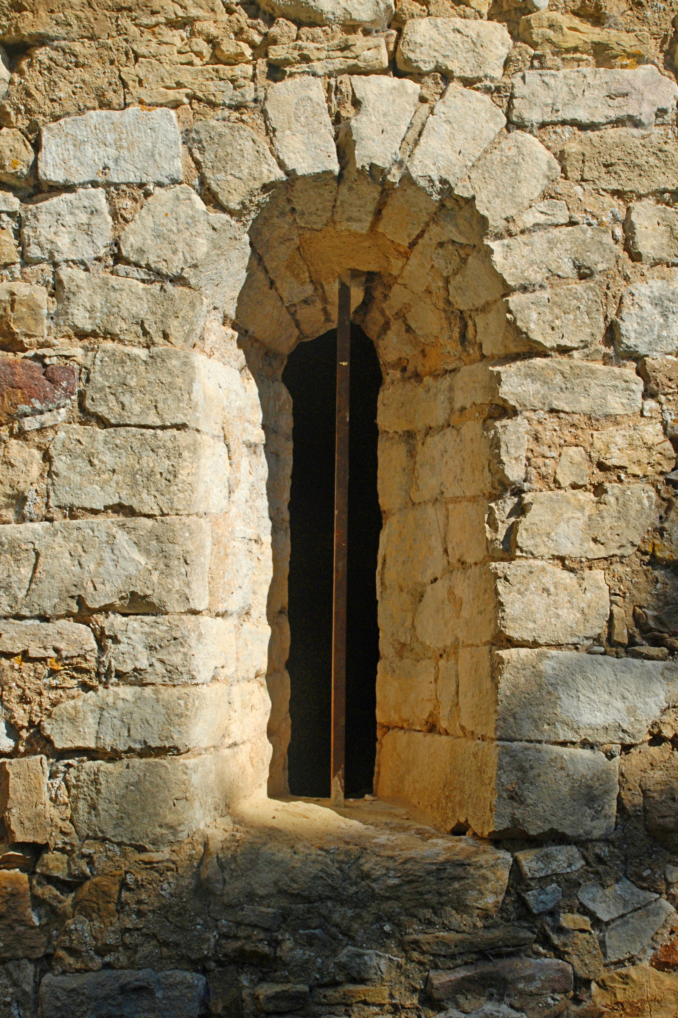 France - Gard - Chapelle Saint-Saturnin de Gaujac